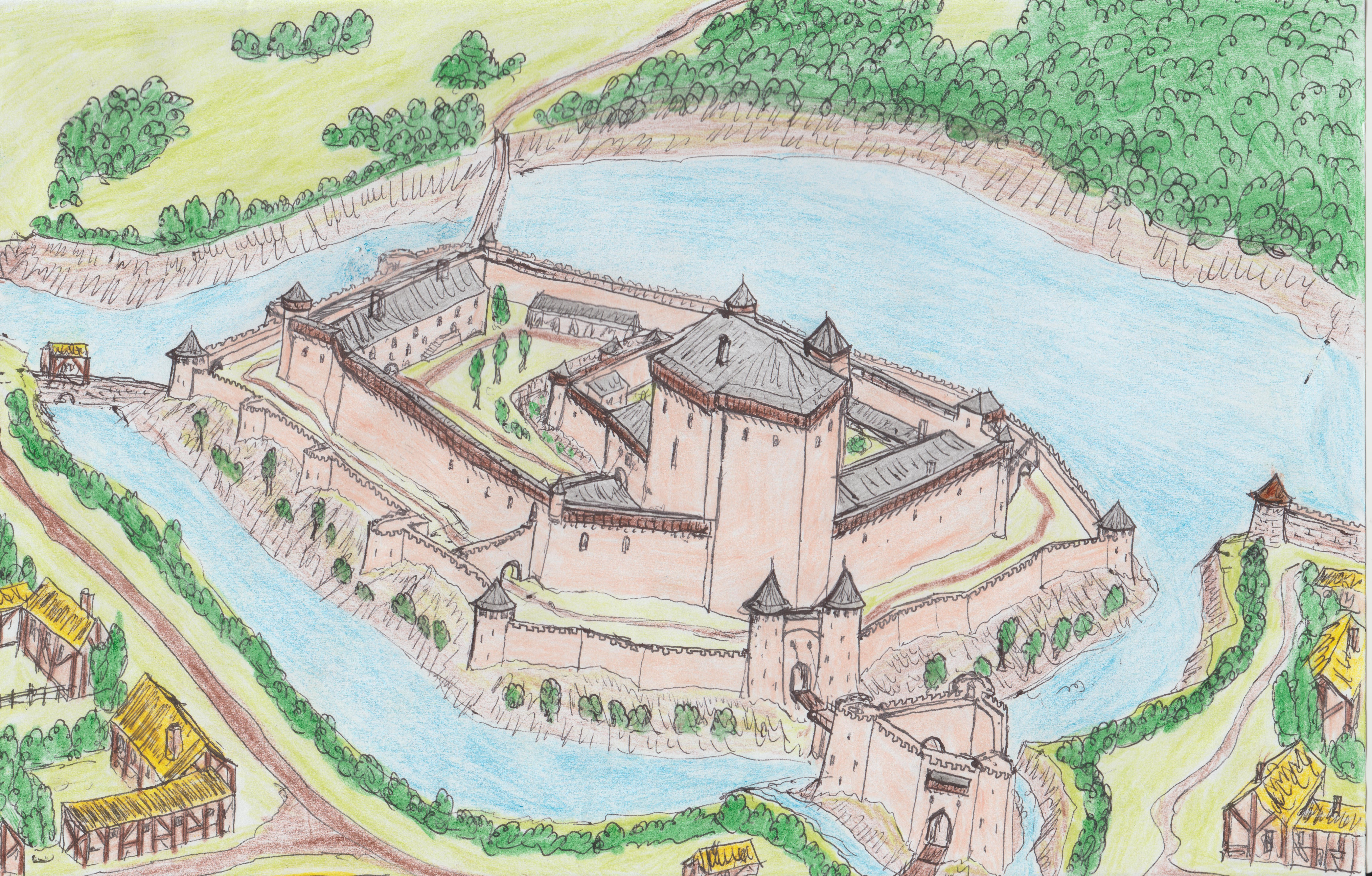 Dessin en couleurs montrant une reconstitution possible du château fort de Talmont-Saint-Hilaire à la fin du XIIe siècle ou au début du XIIIe siècle, sous forme de vue aérienne depuis le Nord-Ouest.